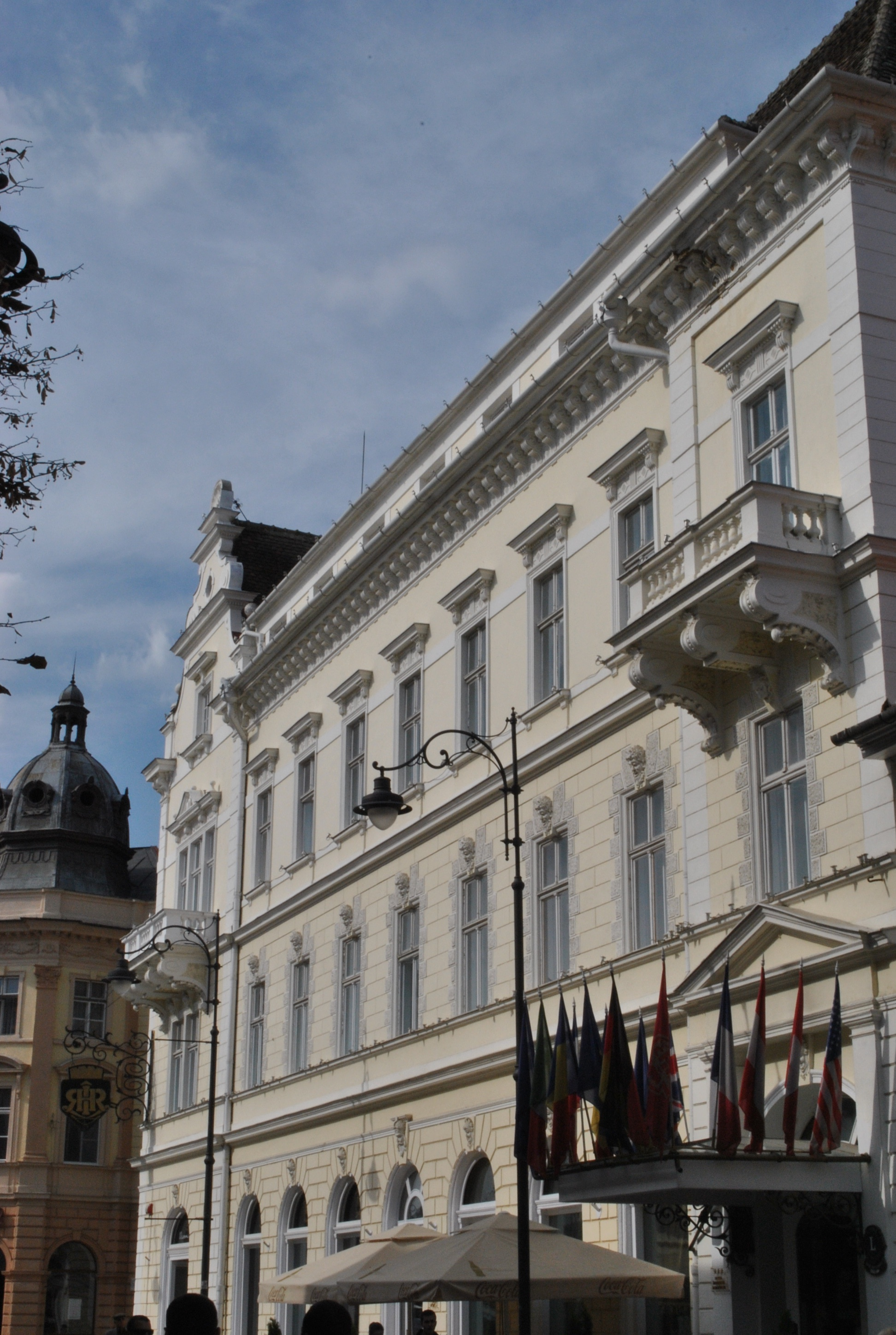 Centrul istoric, sec. XIII-XX